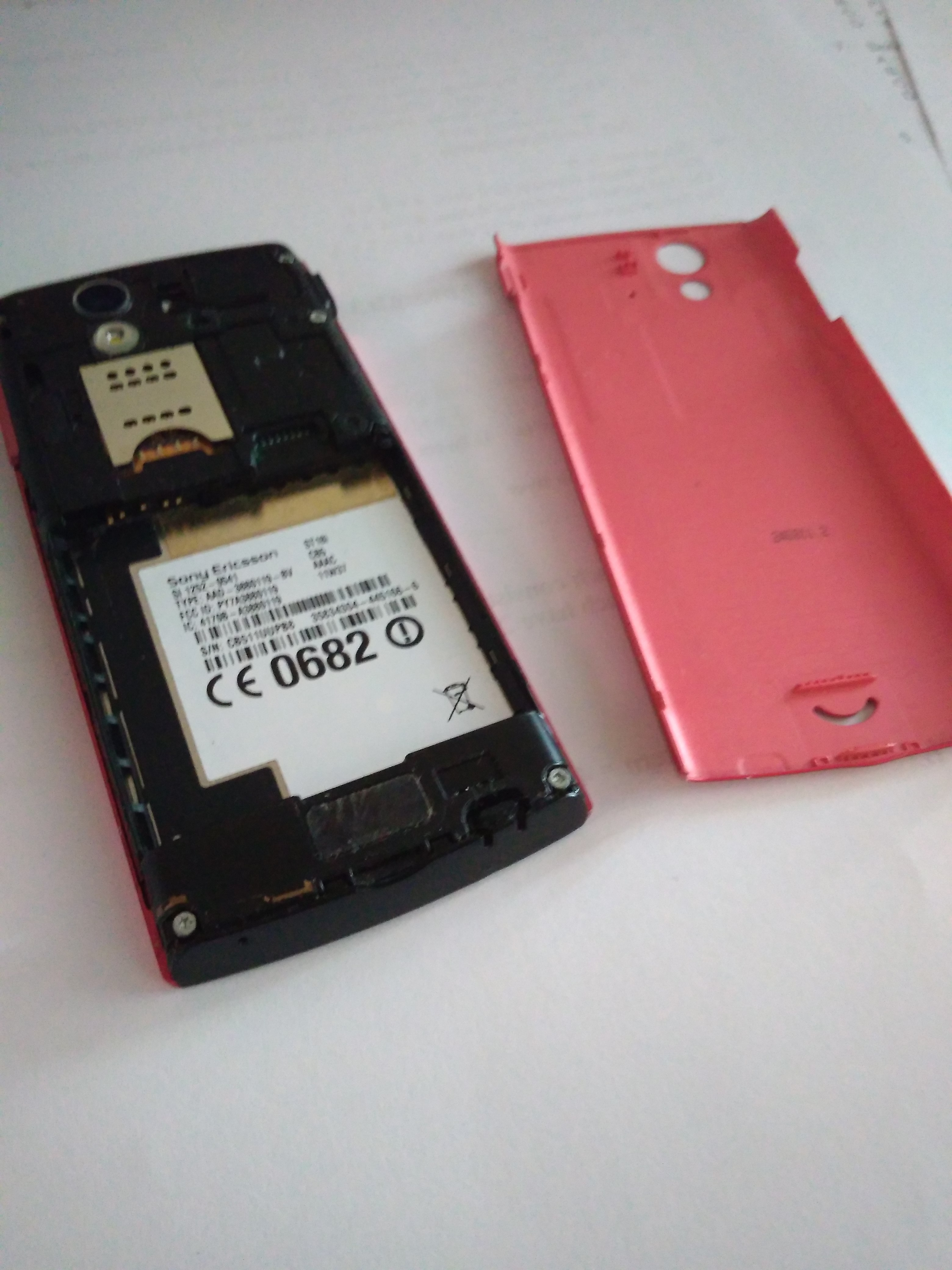 內部